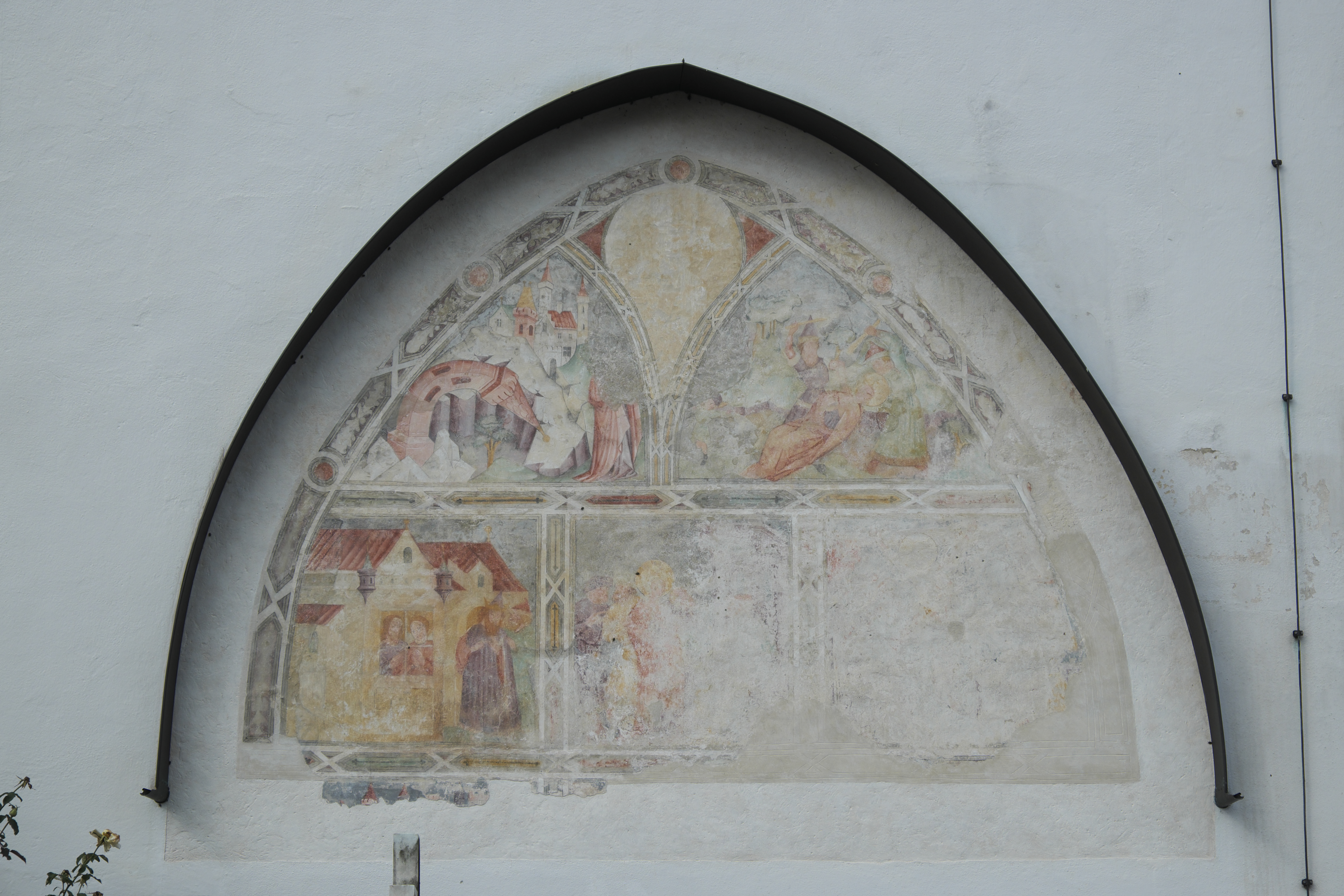 Katholische Pfarrkirche St. Marinus und Anianus, ehemalige Abteikirche des Benediktinerklosters Rott in Rott am Inn im Landkreis Rosenheim (Bayern/Deutschland), Malerei am Turm